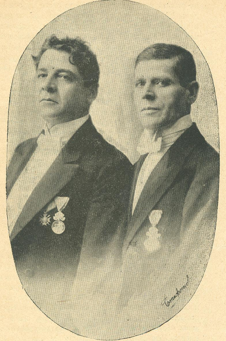 Кръстьо Сарафов и Борис Пожаров